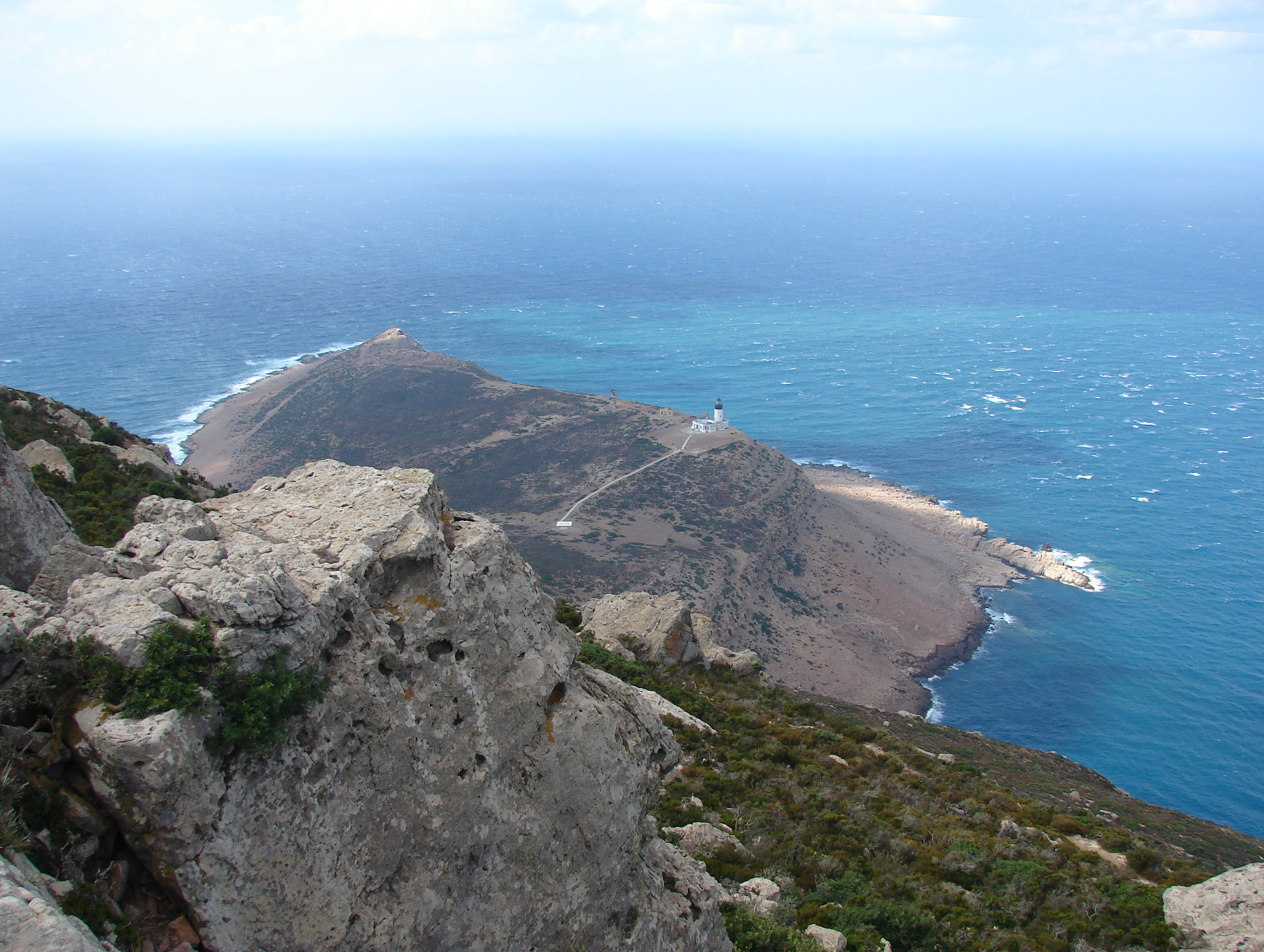 Cap Bon, Tunisia